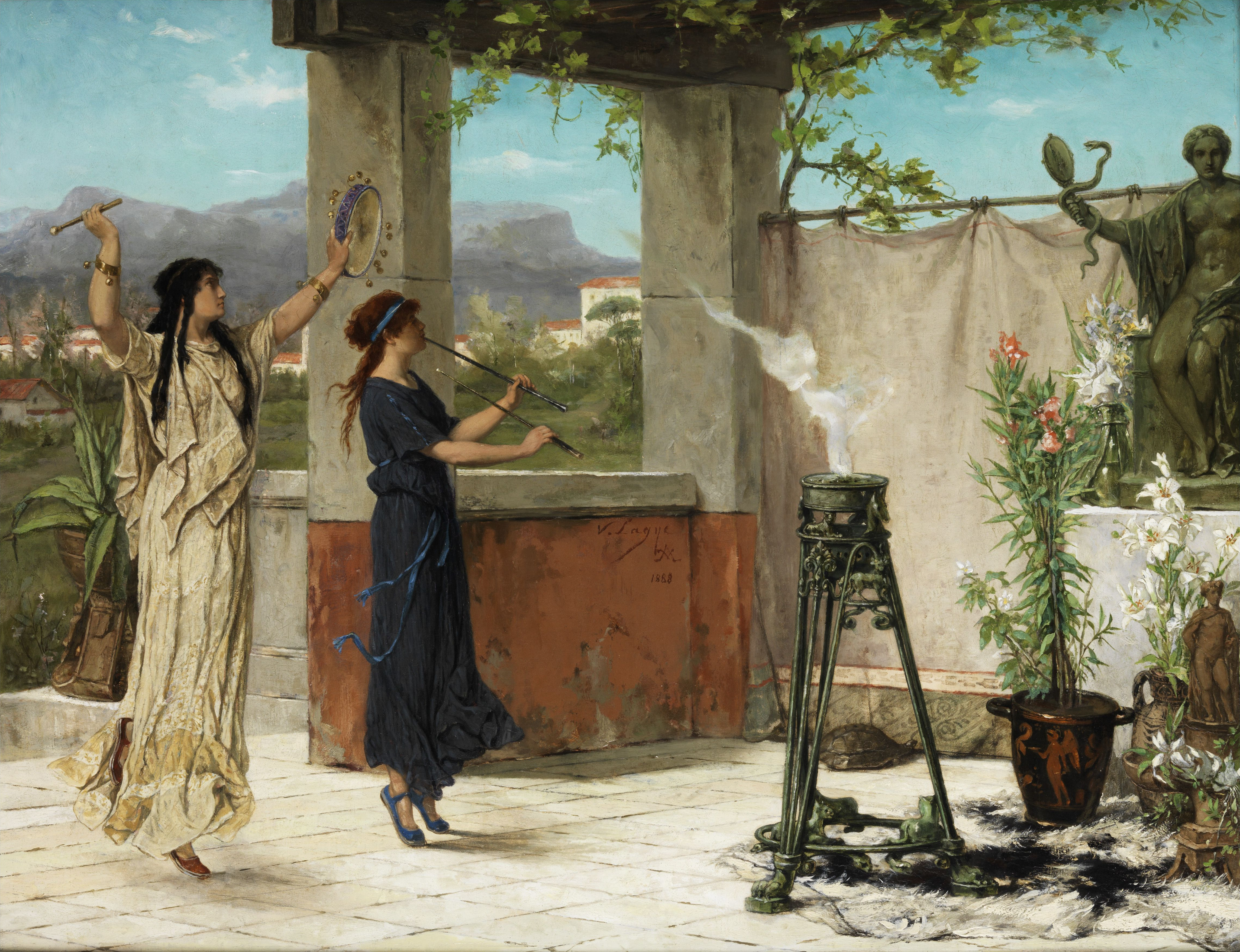 Musizierende Tänzerinnen im Tempel